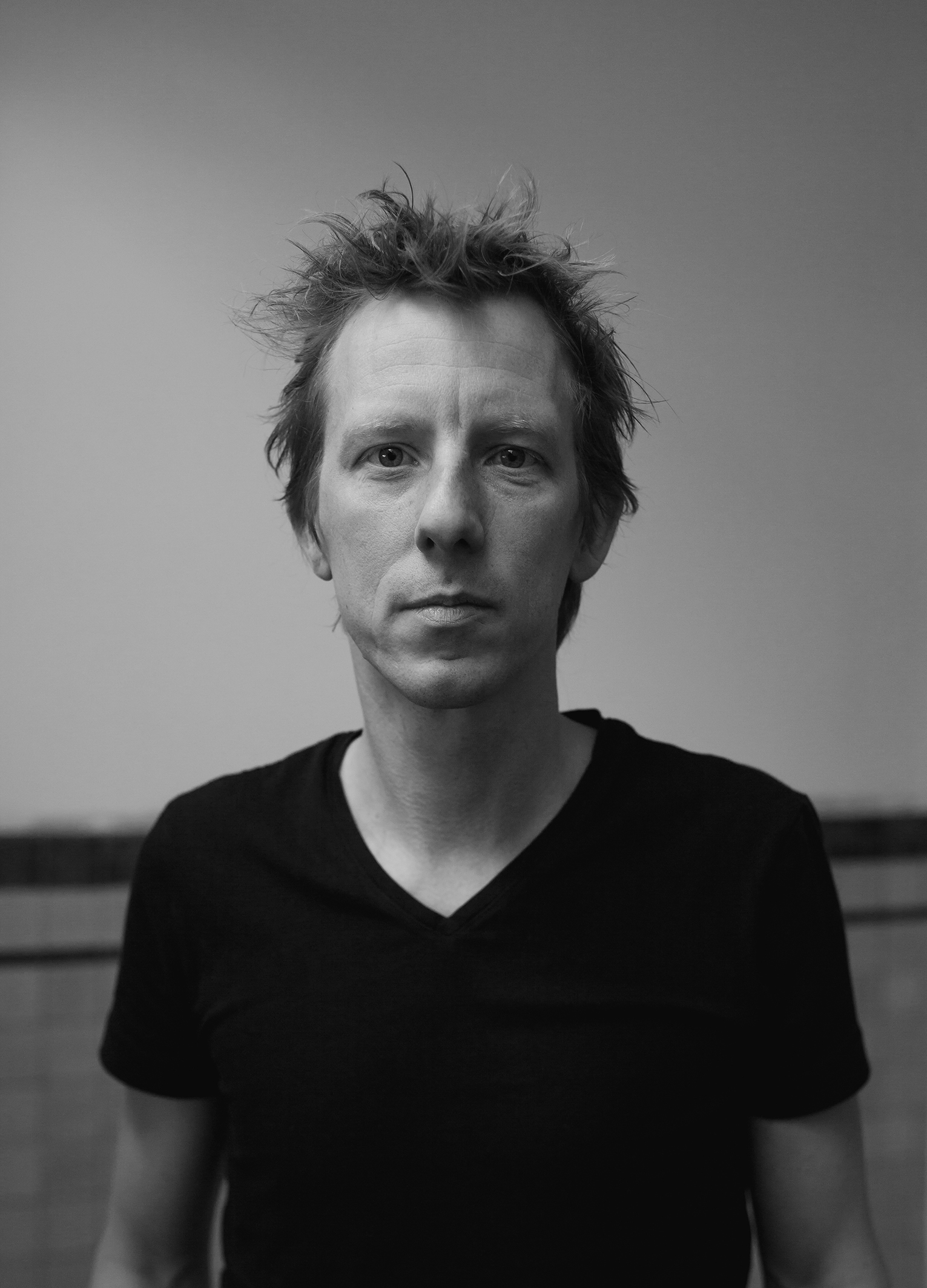 Jasper van Kuijk - Fotografie: Roel van Tour